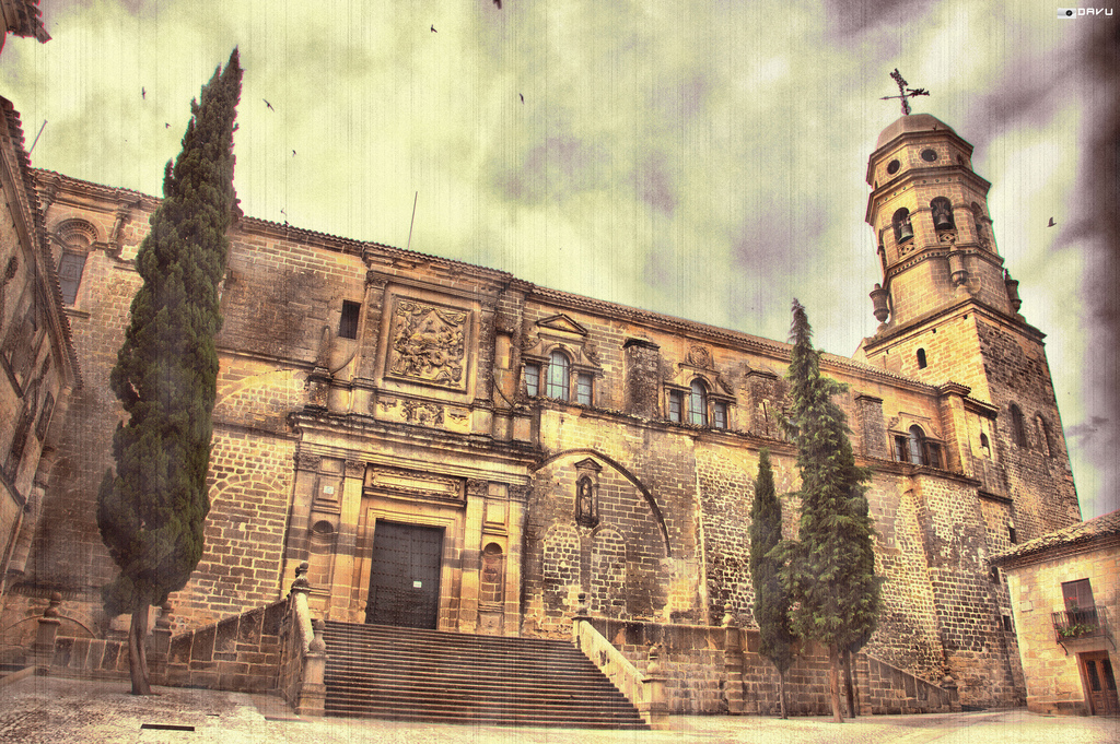 Catedral de Baeza (en Jaen)